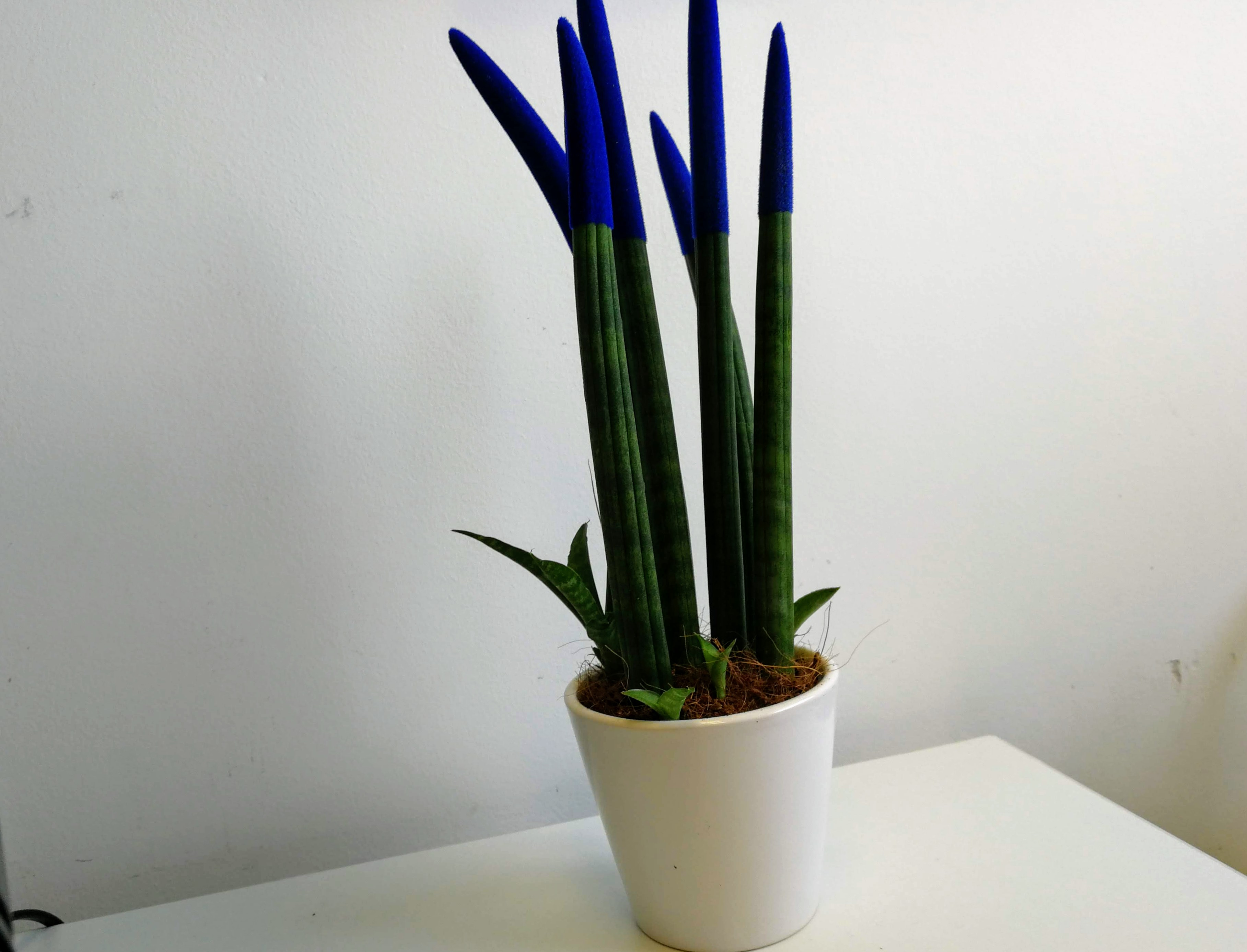 צמח הבריאות, סנסיווריה במשרד